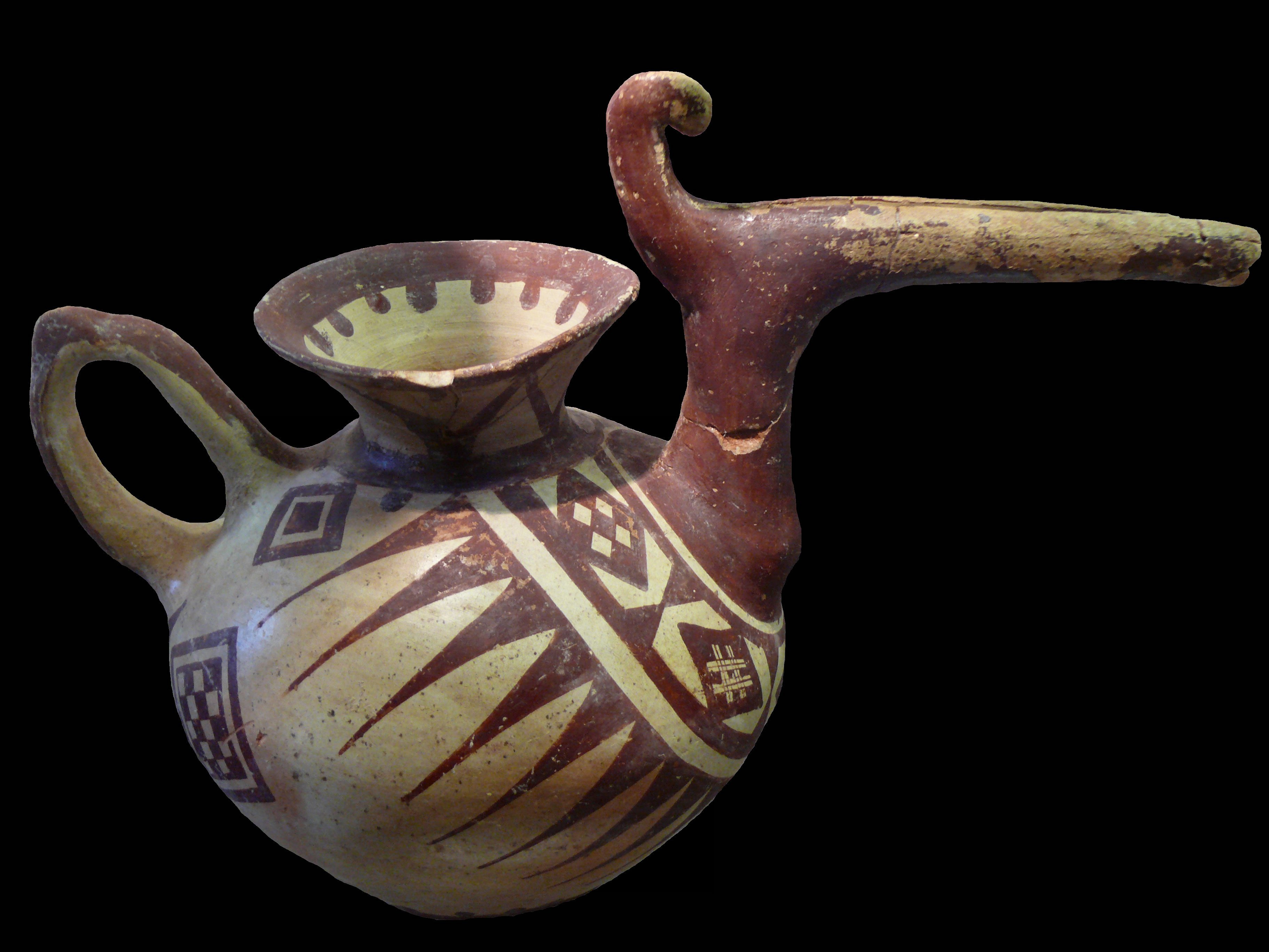 Handled & spouted painted jar, painted ceramic of Tepe Sialk (Iranian prehistory, district of Kashan, Isfahan province) 4th to 2nd millennium BCE at the Louvre Museum, Paris, France, March 2010. Vase à anse et bec verseur, céramique peinte de Tepe Sialk (Préhistoire iranienne, district de Kashan, province d’Ispahan) 4ème au 2ème Siècle BCE au musée du Louvre, Paris, France, Mars 2010